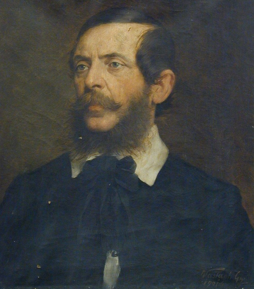 Vastagh György, id.: Kossuth portréja (egészalakos festmény részlete) (fotója alapján)